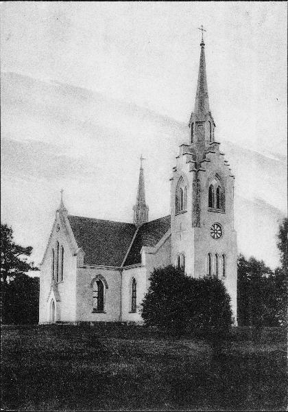 Kyrkan från nordväst. Kategori: (01) ExteriörerKyrkan från nordväst.